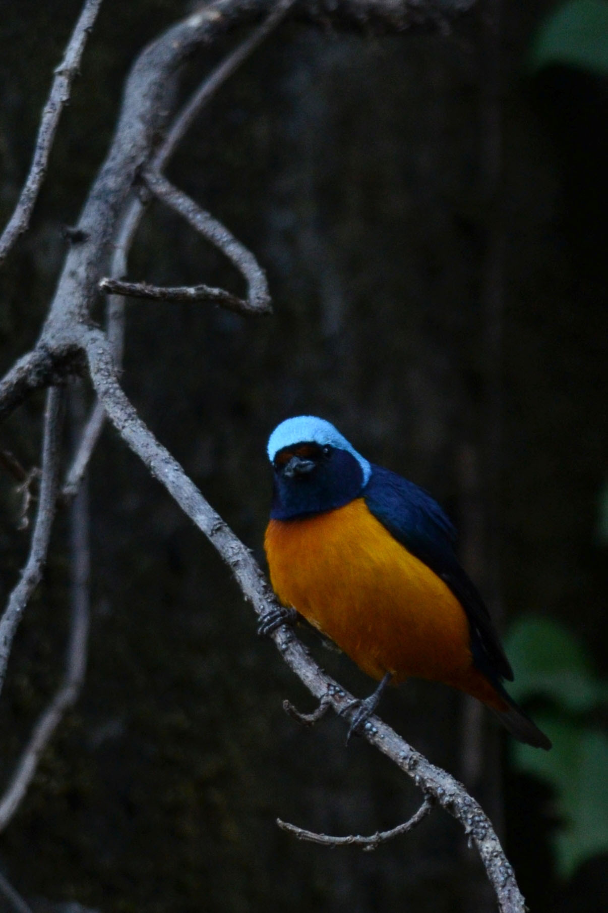 Tepoztlan, Morelos, México